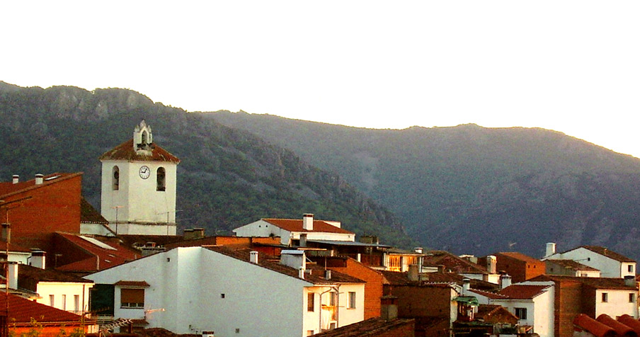 Vista de Castañar de Ibor (Cáceres, España), con la Sierra de Villuercas al fondo.